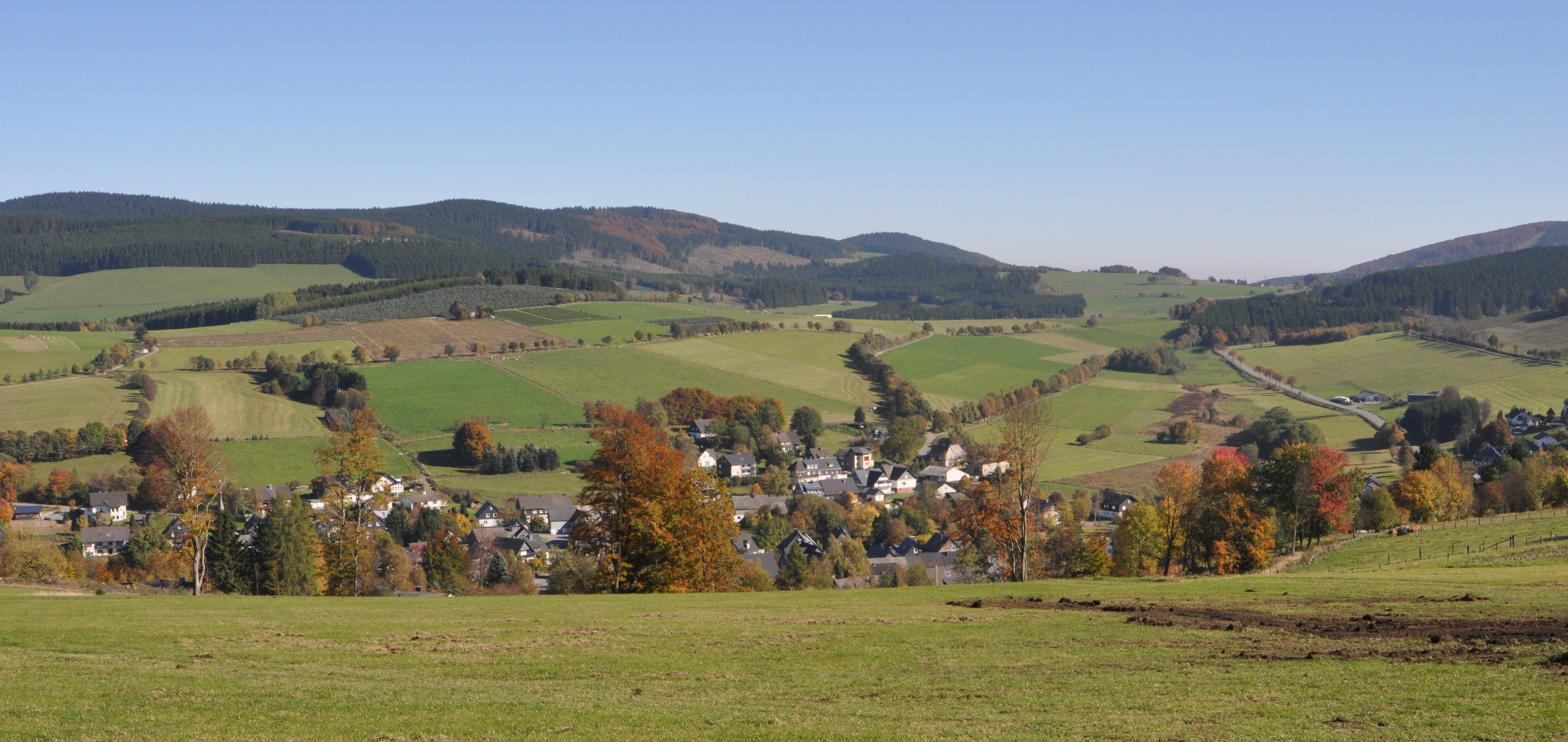 Panoramaansicht von Grönebach, Hochsauerlandkreis